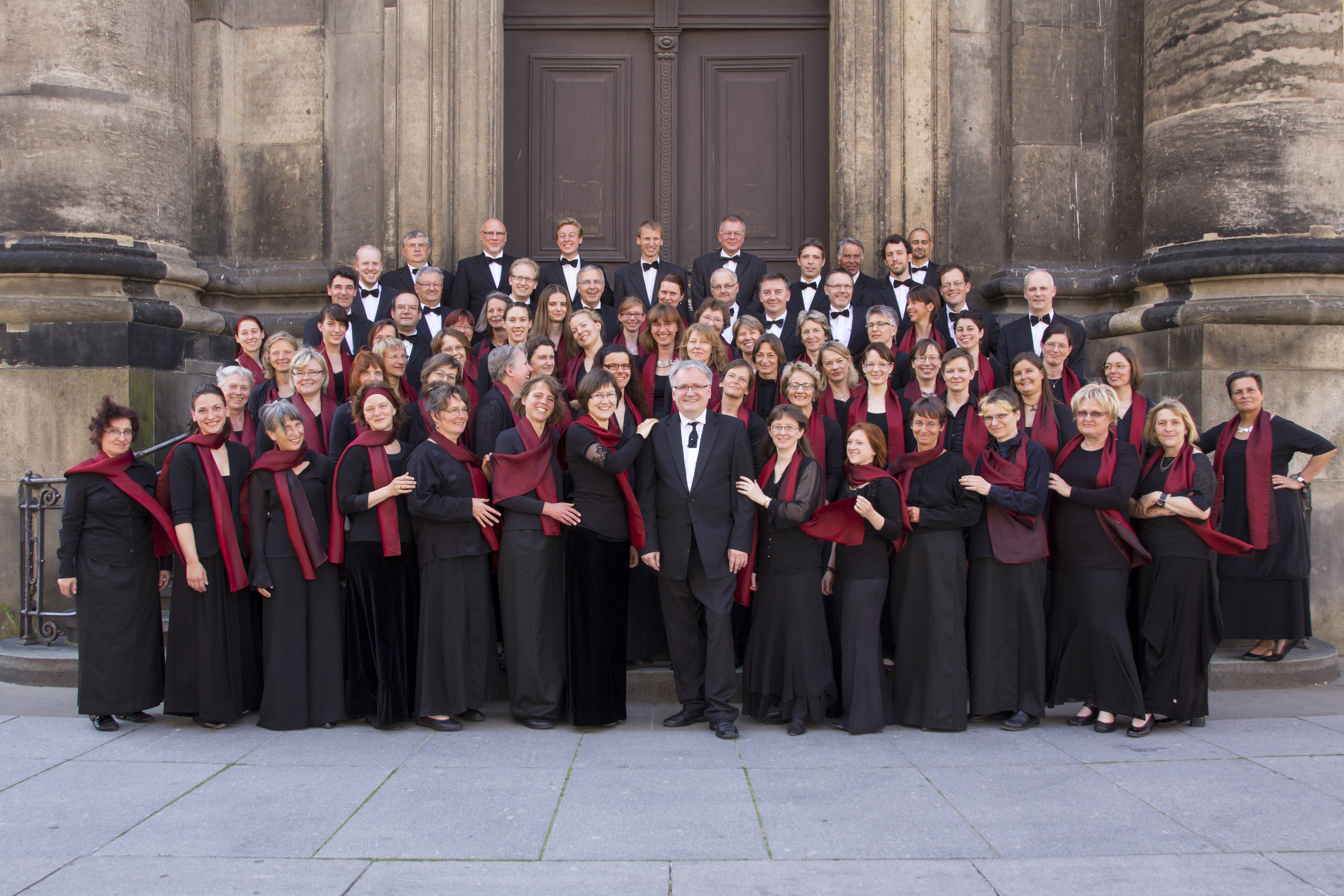 Singakademie Dresden 2015